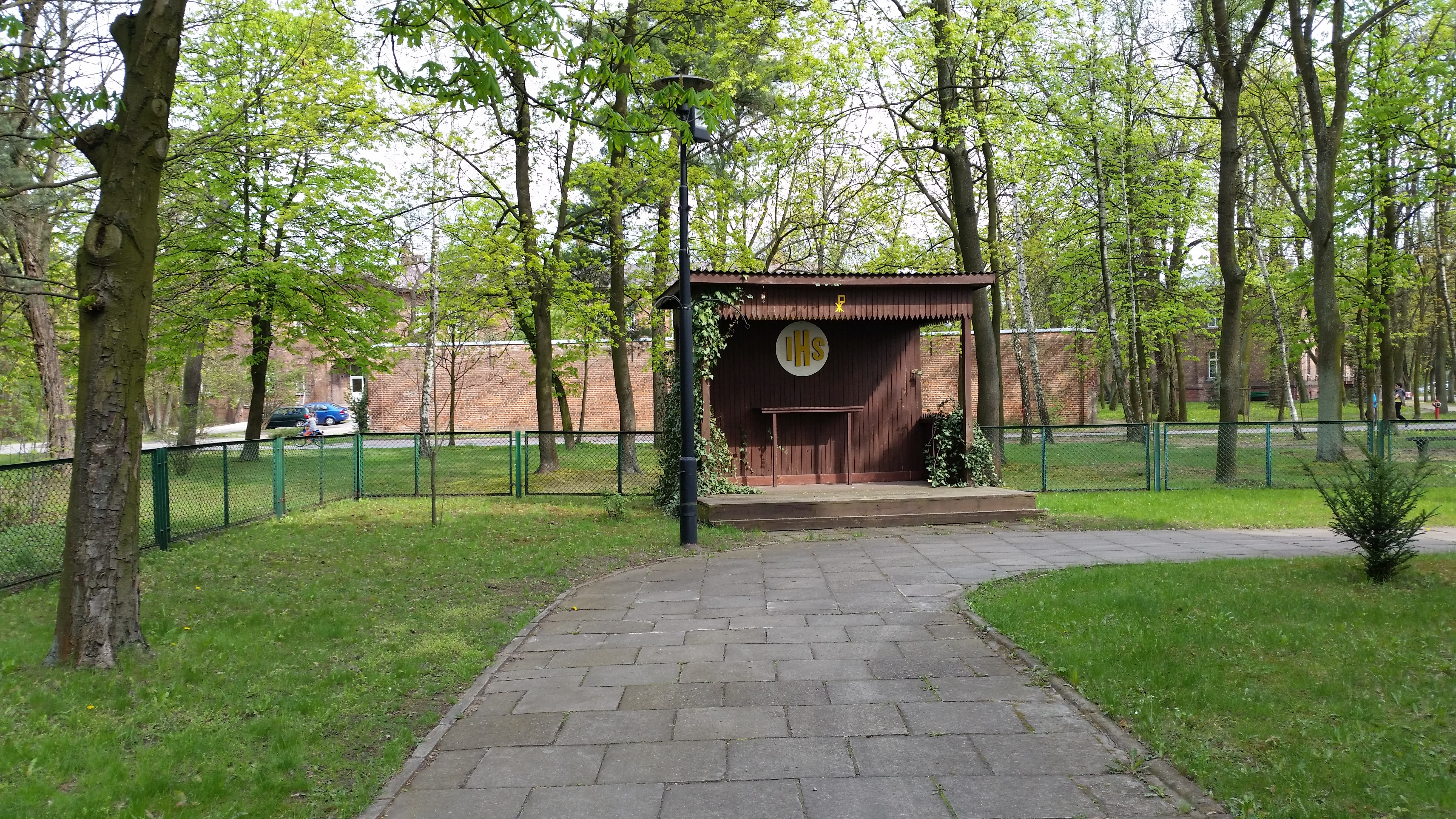 Wiata do odprawiania mszy na zewnątrz Kościoła Przemienienia Pańskiego w Pruszkowie